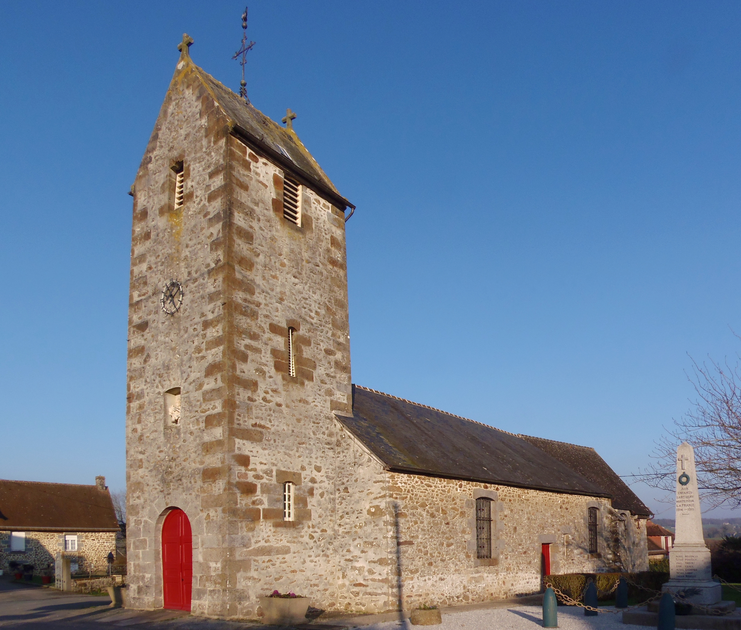 Antoigny (Normandie, France). L'église Saint-Martin.